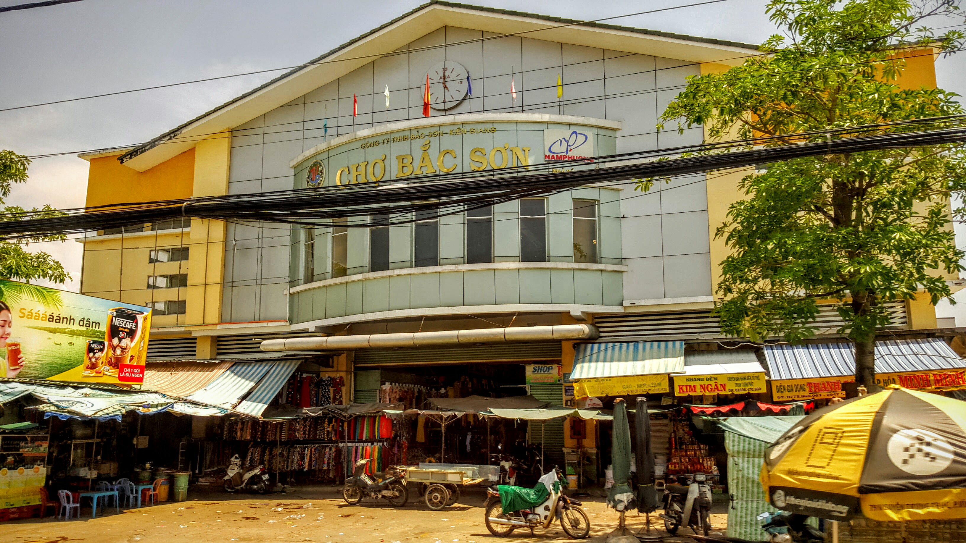 Cho Bac Son, duong Ngo Quyen, phuong Vĩnh Lạc, tp. Rạch Giá, tỉnh Kiên Giang, Việt Nam,02/07/16/Dyt